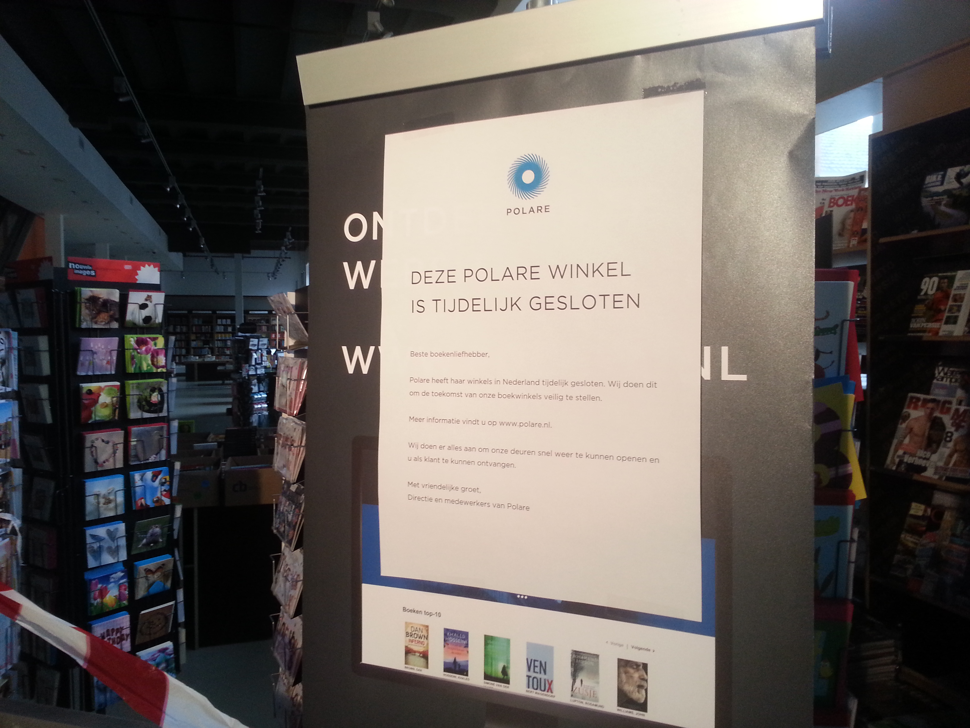 Plakkaat in de gesloten Polare in Arnhem